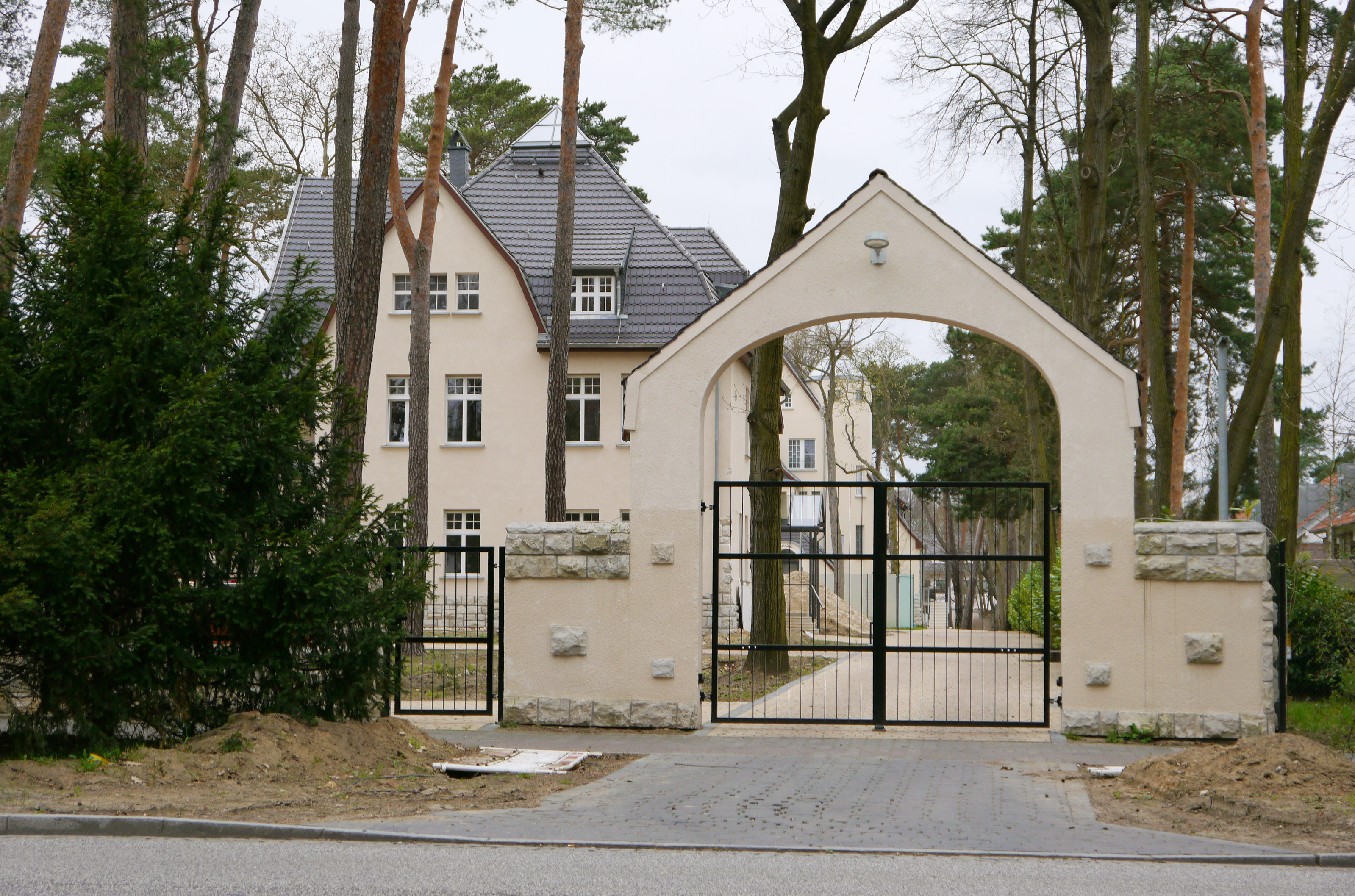 Baudenkmal: Zehlendorfer Damm 71, Kleinmachnow, Ehemaliges Seemannserholungsheim